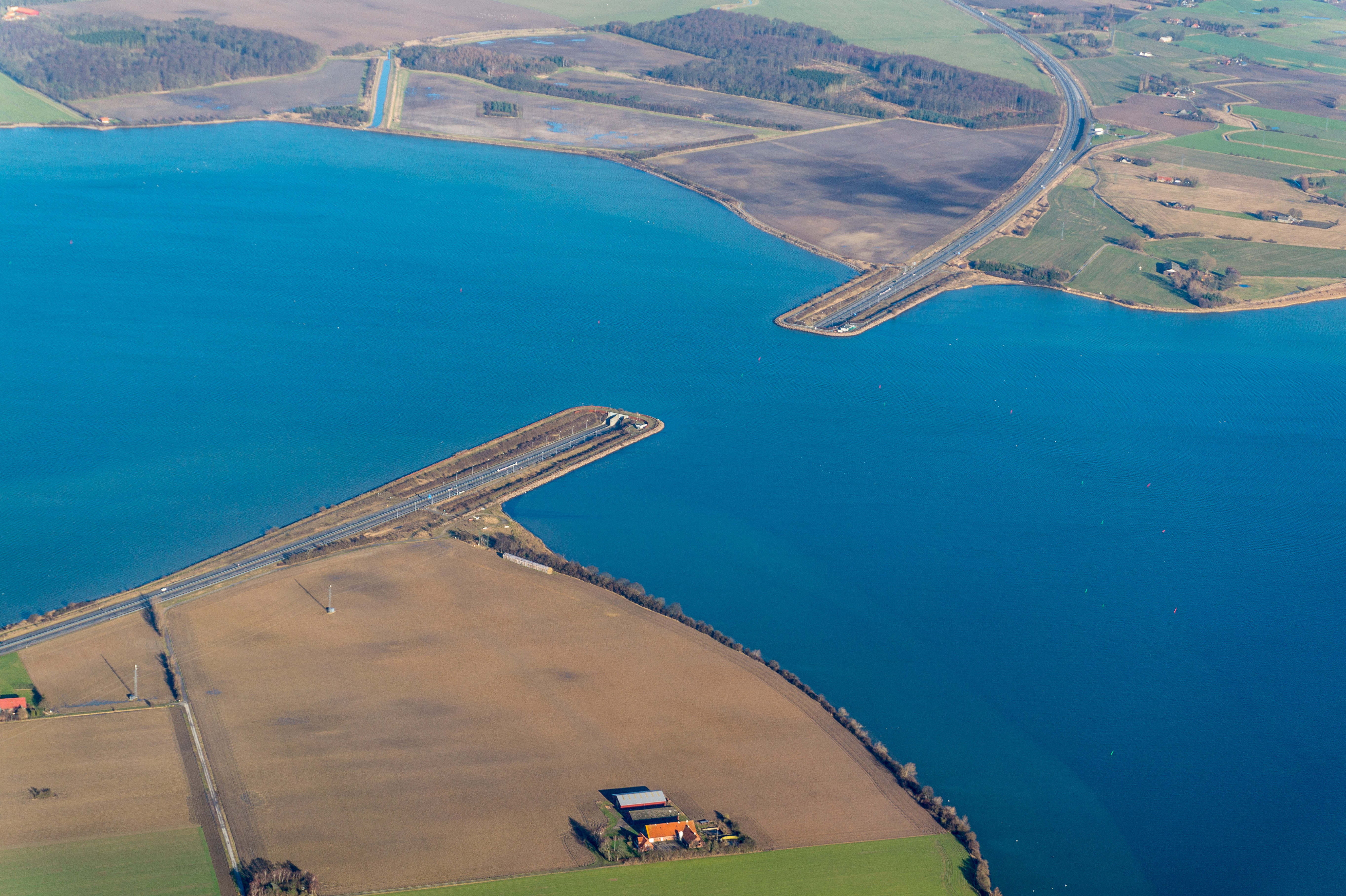 Tunnel in Guldborgsund